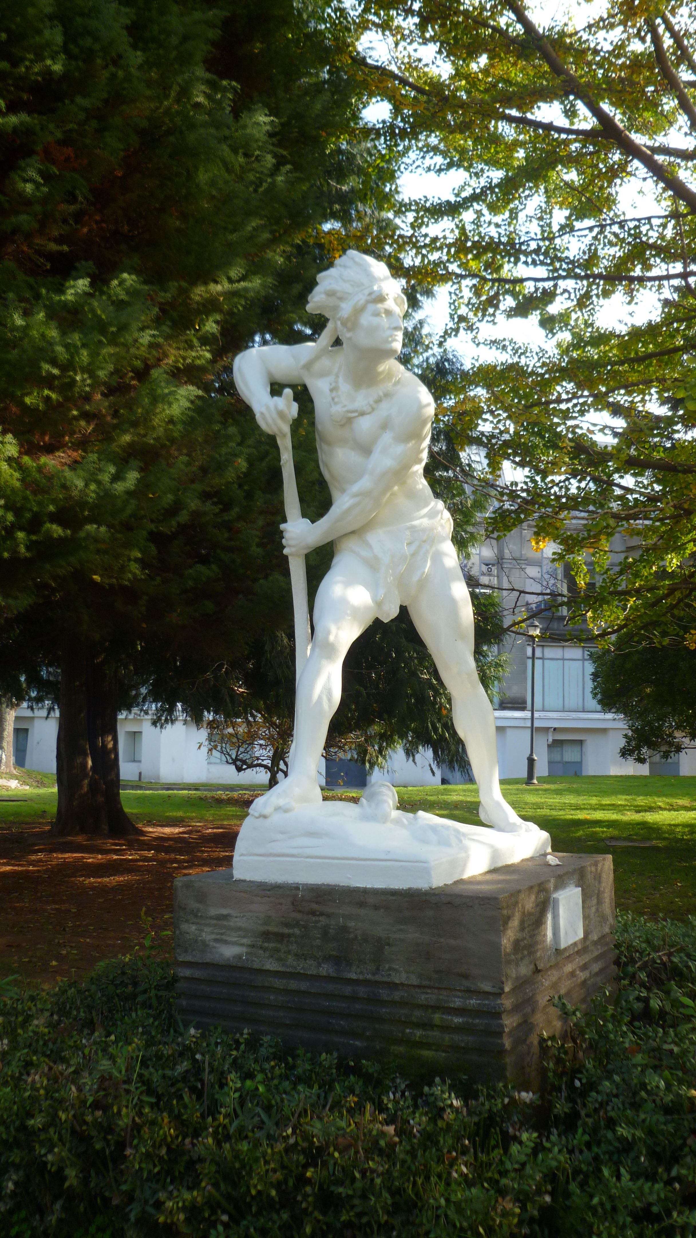 Estatua de Caupolican en udec